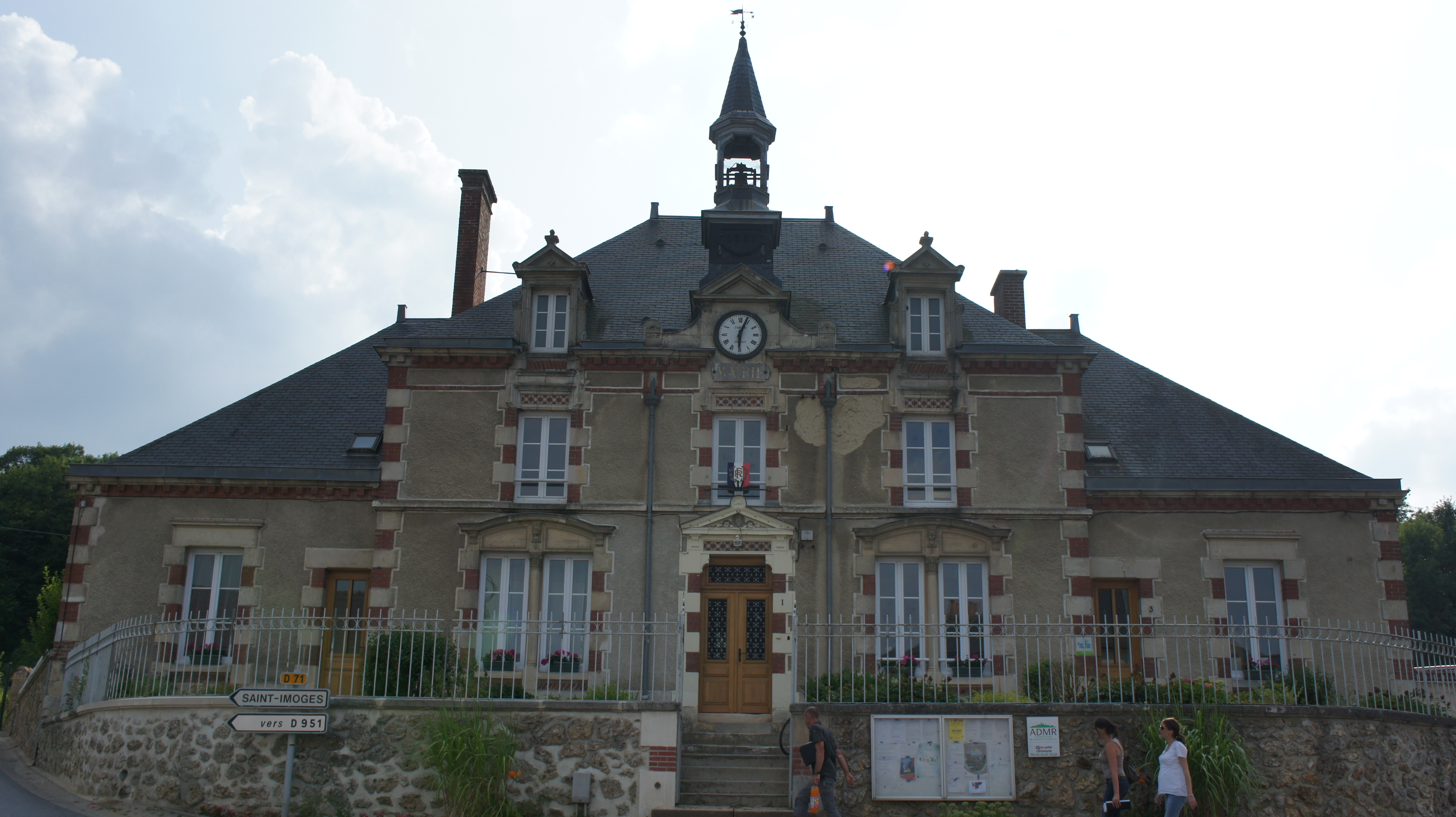 Une vue de .